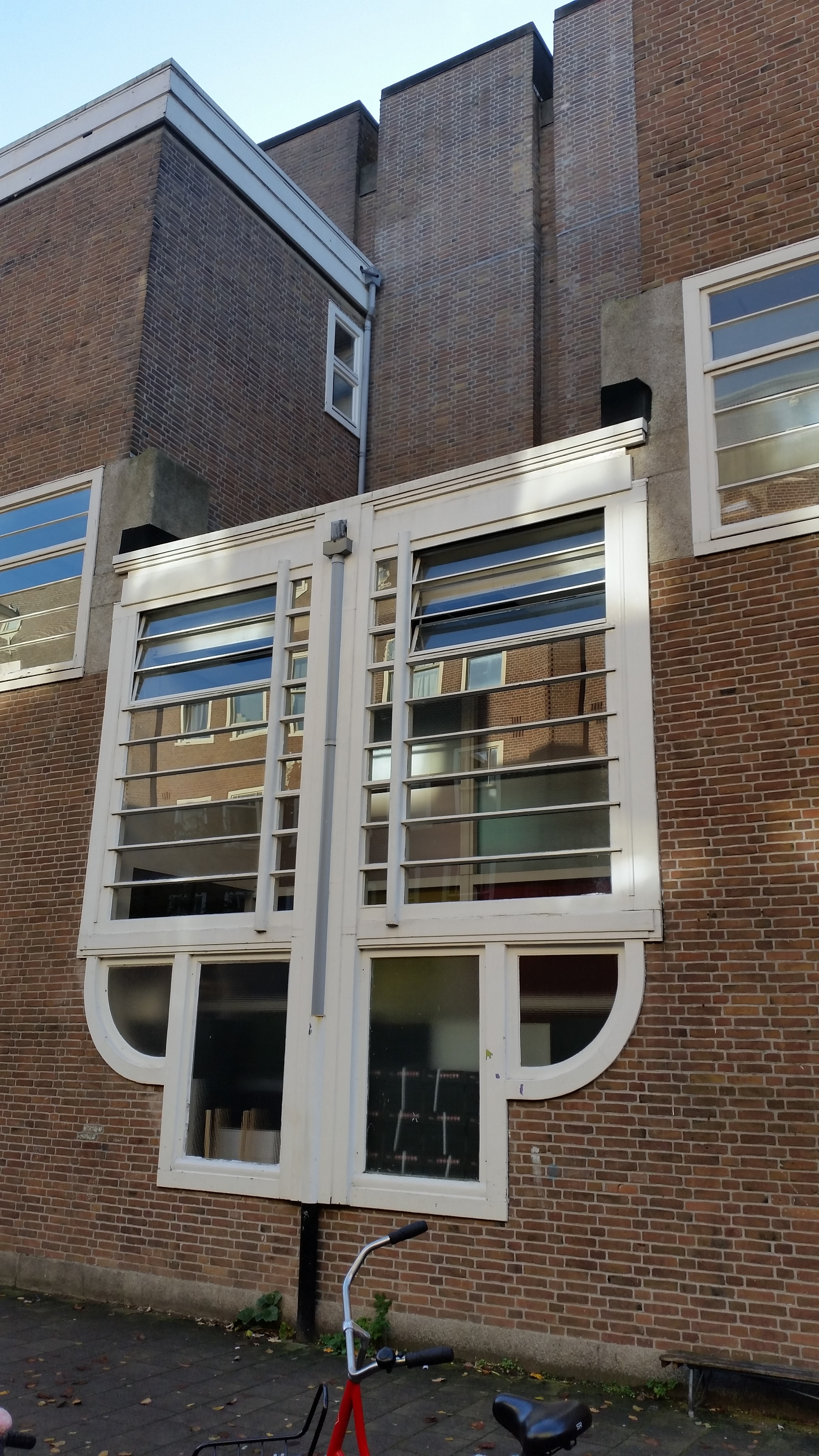 Gebouwen aan de Jan van Riebeekstraat, Amsterdam-West